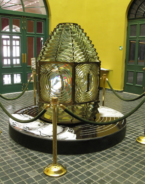 Faro del antiguo canal de los franceses, en exhibición en el Museo del Canal Interoceánico de Panamá.